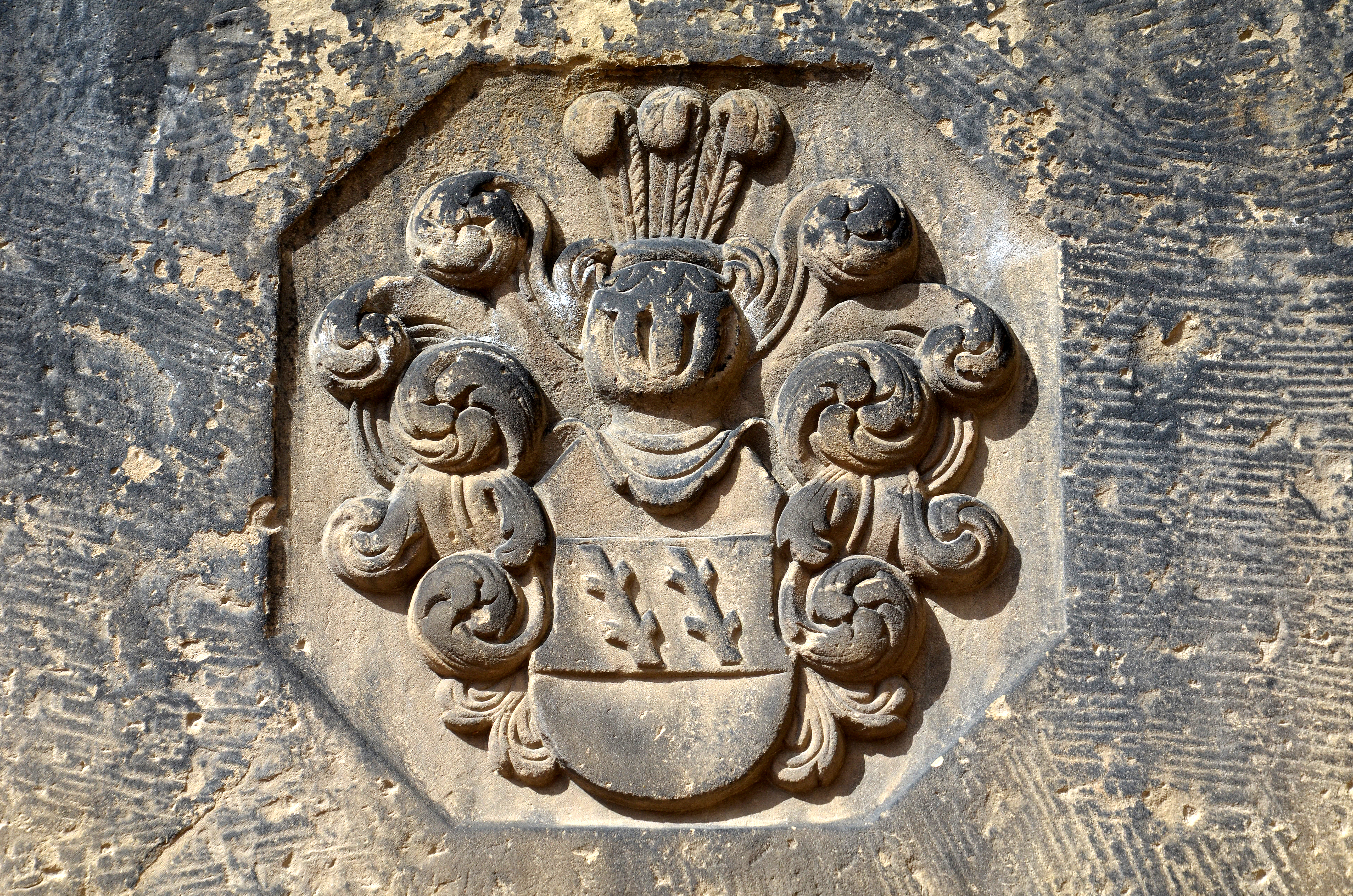 Wappen auf dem Doppel-Grabstein (heute Epitaph) an der südlichen Kirchturmmauer der Neustädter Hof- und Stadtkirche St. Johannis in Hannover, Stadtteil Calenberger Neustadt, für den Kurfürstlich Hannoverschen Oberstallmeister Christian Friedrich von Harling ...